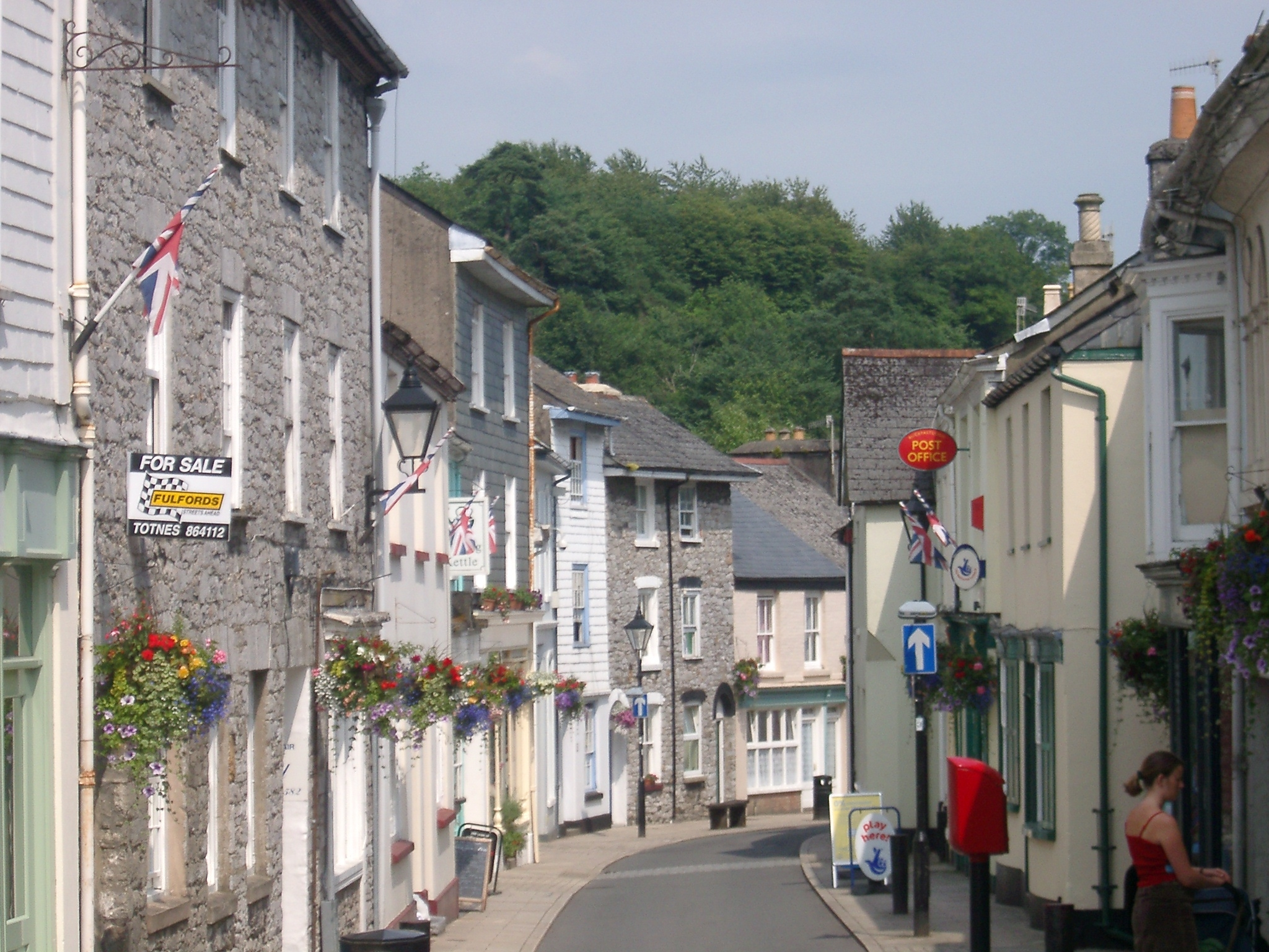 Buckfastleigh, Devon, Main Road